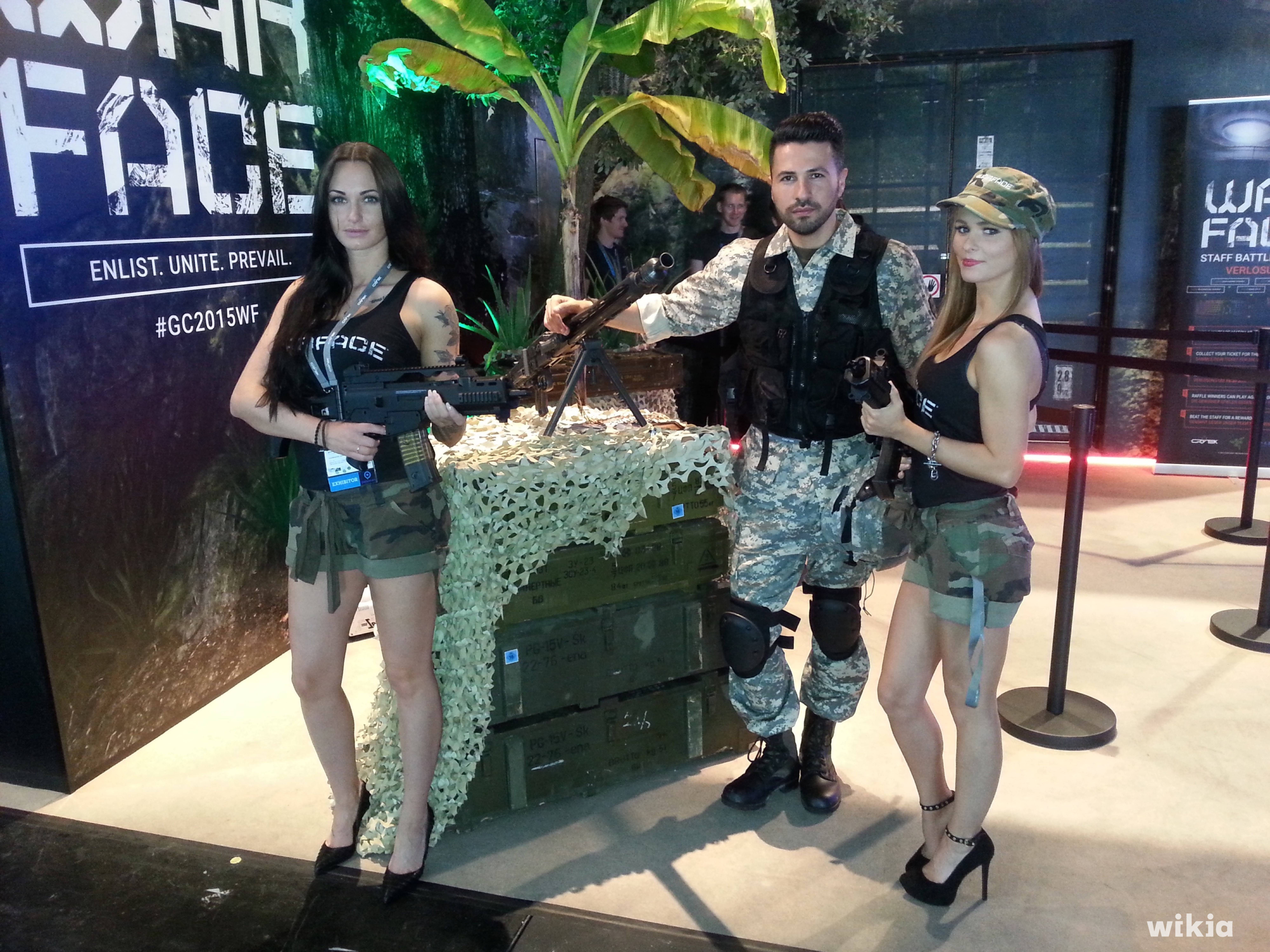 Impressionen: Zweiter Tag, Donnerstag (offen für alle!) Gamescom 2015 impressions